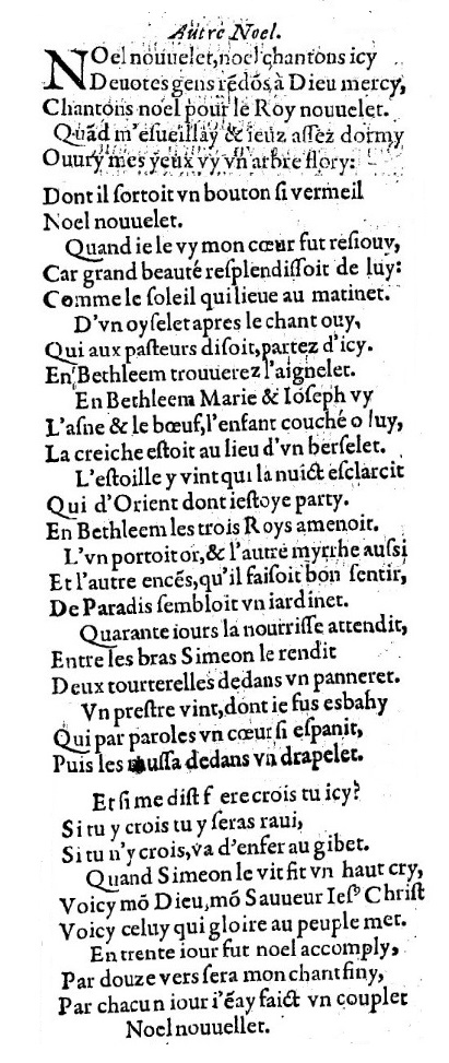 Texte de Noël nouvelet, 1550